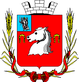 Герб Черкасc (1864)